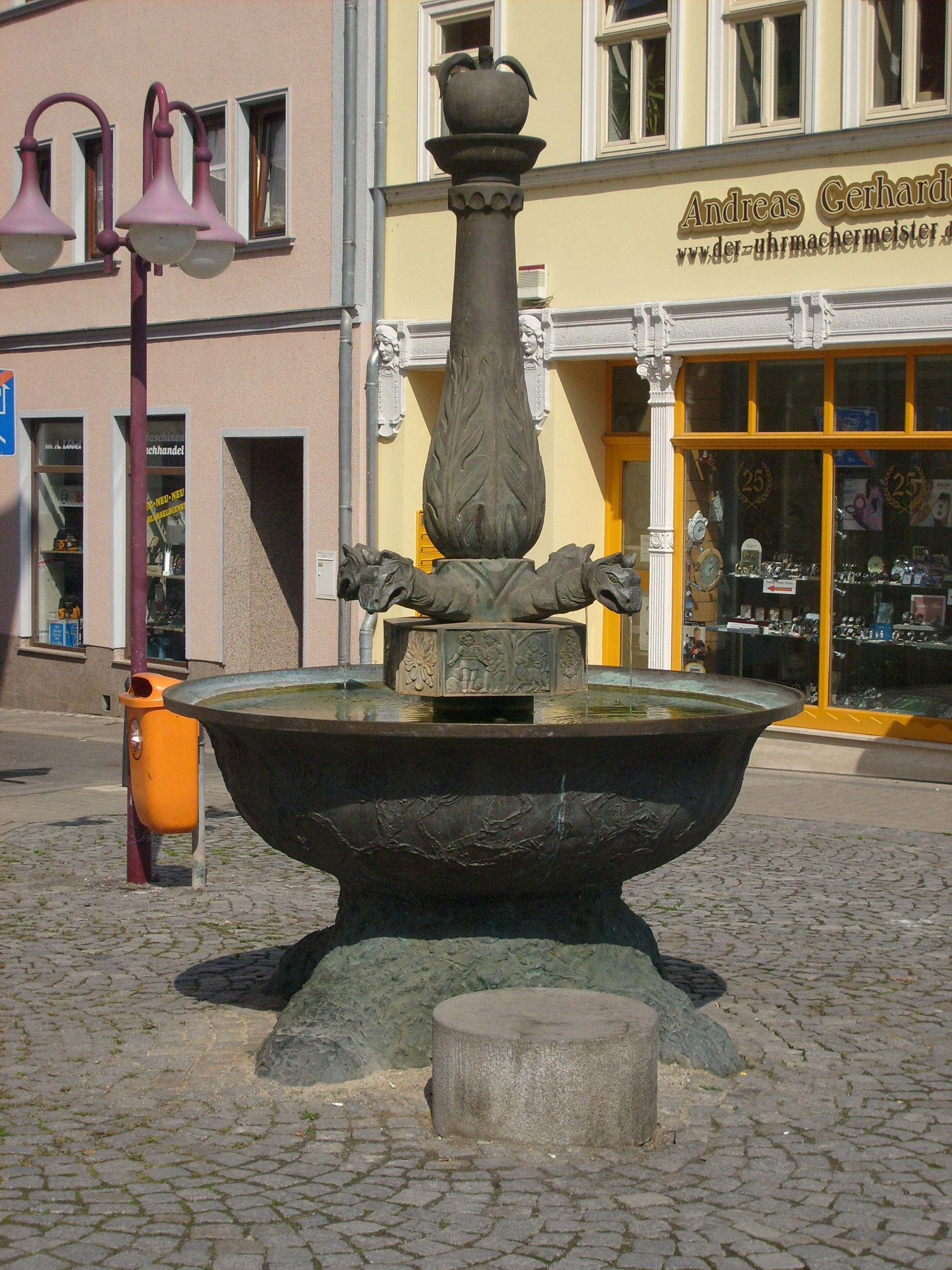 Brauhofbrunnen